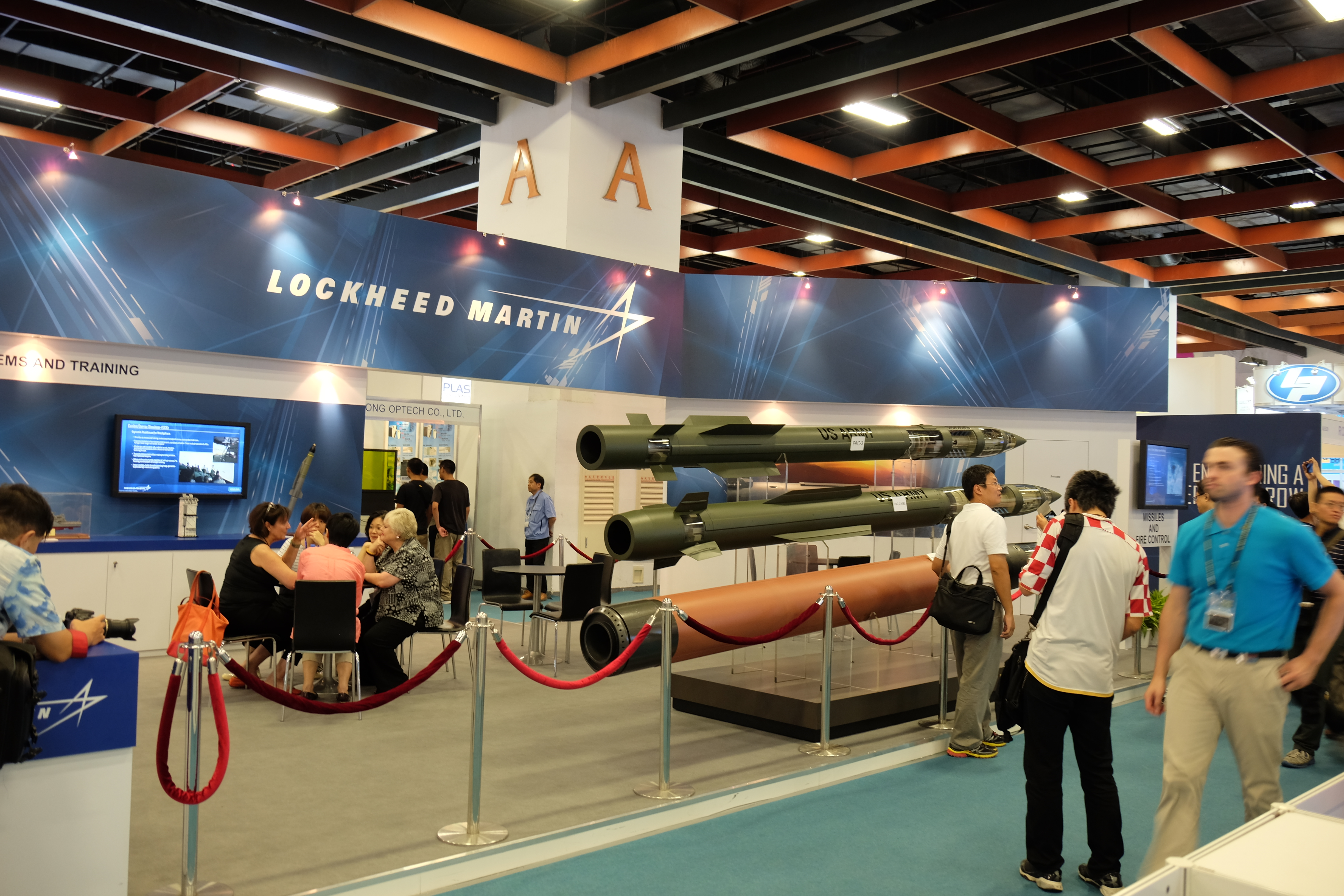 2015台北國際航太暨國防工業展覽會第三日，洛克希德．馬丁攤位。